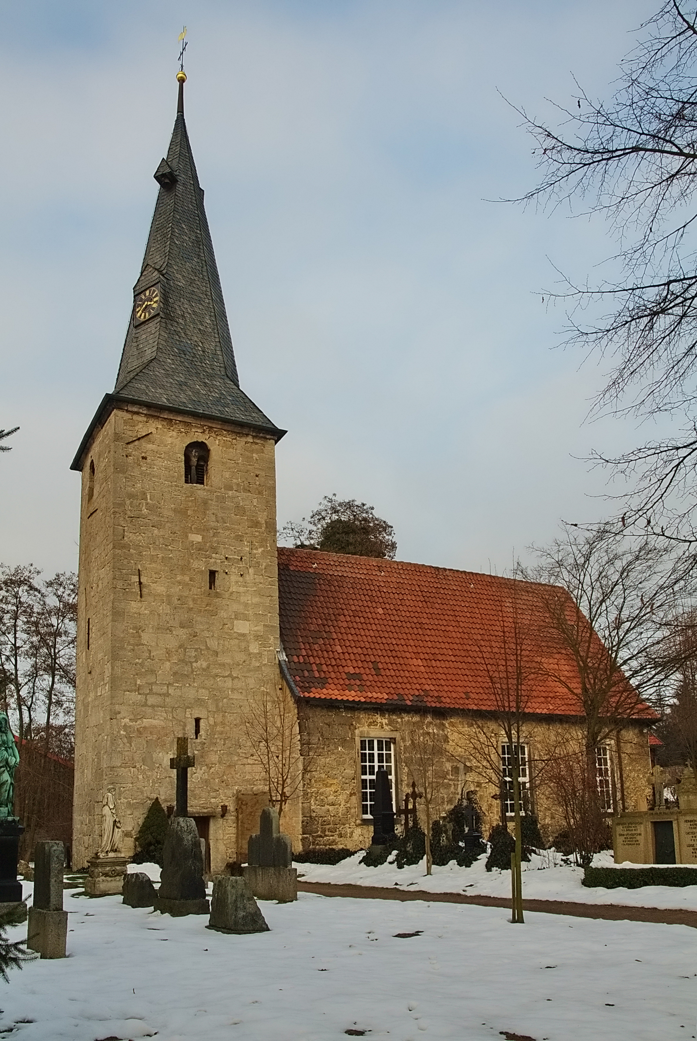 St.Georg-Kirche in Bledeln (Algermissen), Niedersachsen, Deutschland